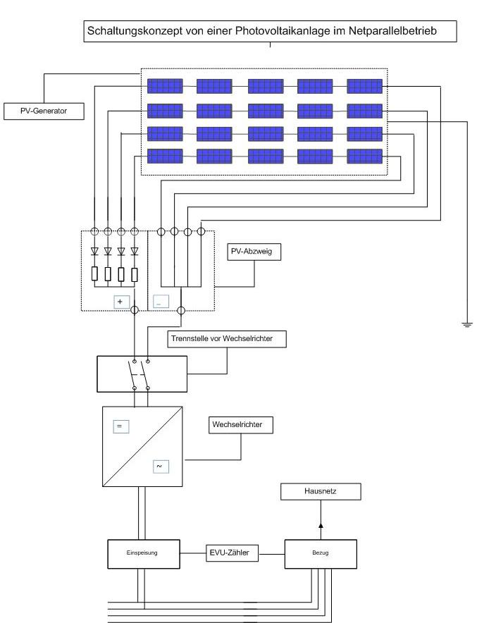 Schaltungskonzept PV-Anlage